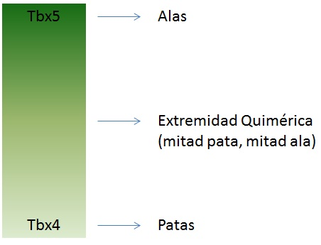 Diagrama que ilustra de forma sencilla como se genera la especificación de extremidades anteriores (arriba) y posteriores (abajo). Cuando se induce la aparición de una extremidad ectópica, el tipo de extremidad dependerá del gen Tbx que se exprese en mayor proporción. Si ambas proporciones son iguales se puede obtener como resultado una extremidad quimérica con estructuras características de ala y de pata.